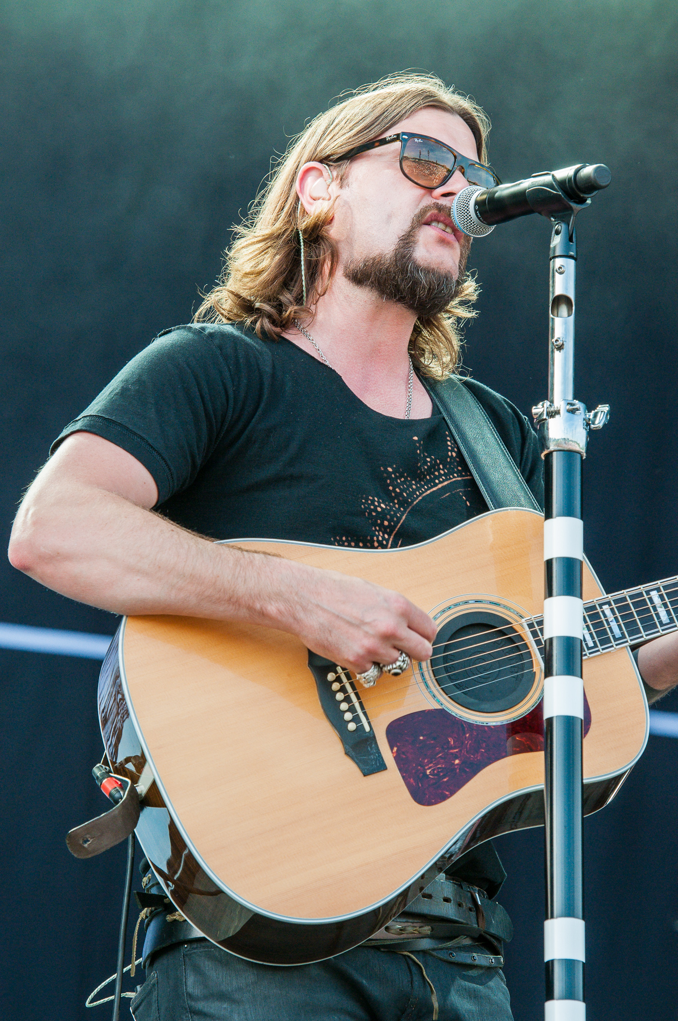 ARGO-Konzerte,Centerstage,Konzert,Livekonzert,Livemusik,Musik,Rea Garvey,RiP,Rock im Park 2014